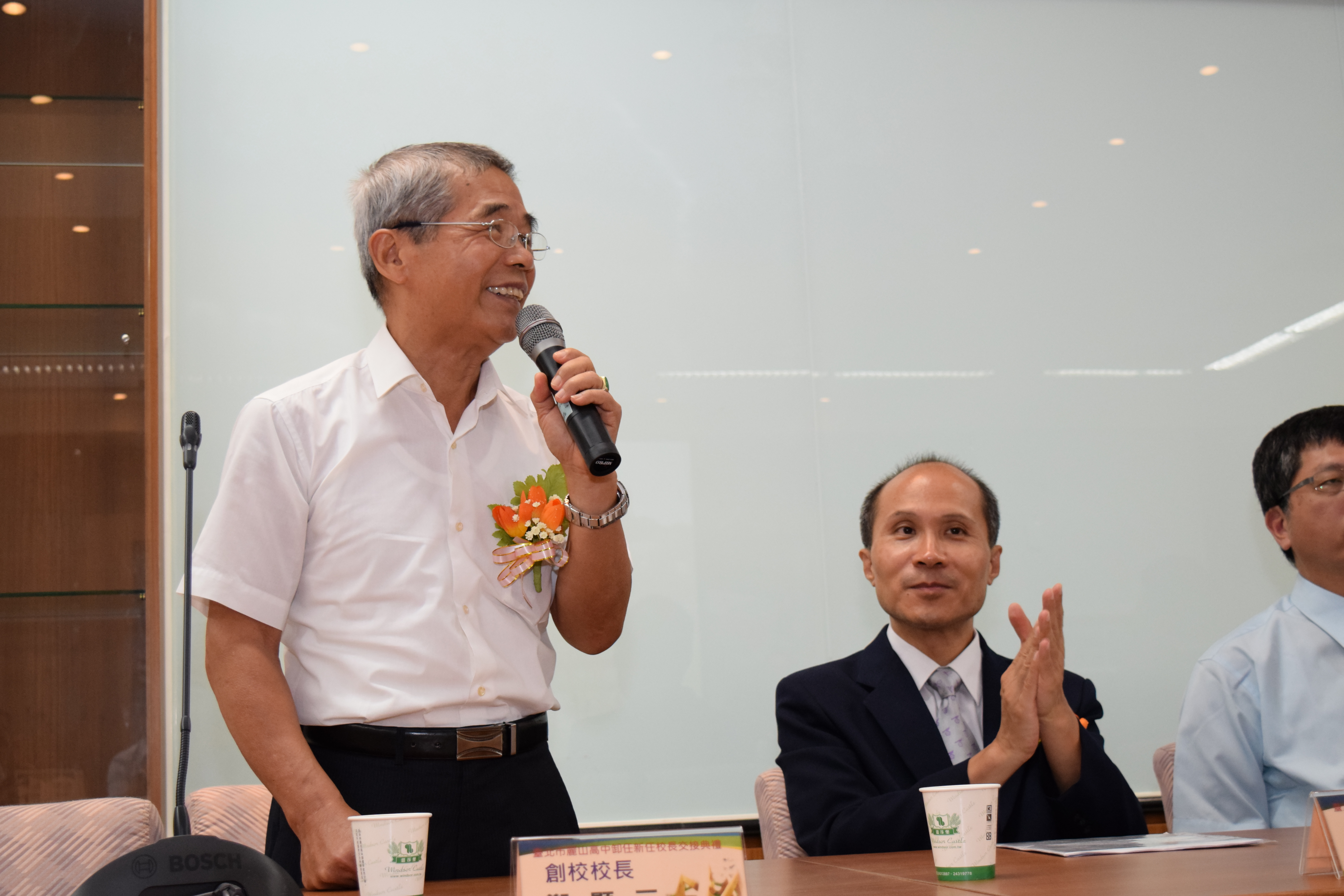 文言: 於2015年第四任校長就職典禮上鄭顯三先生分享往事